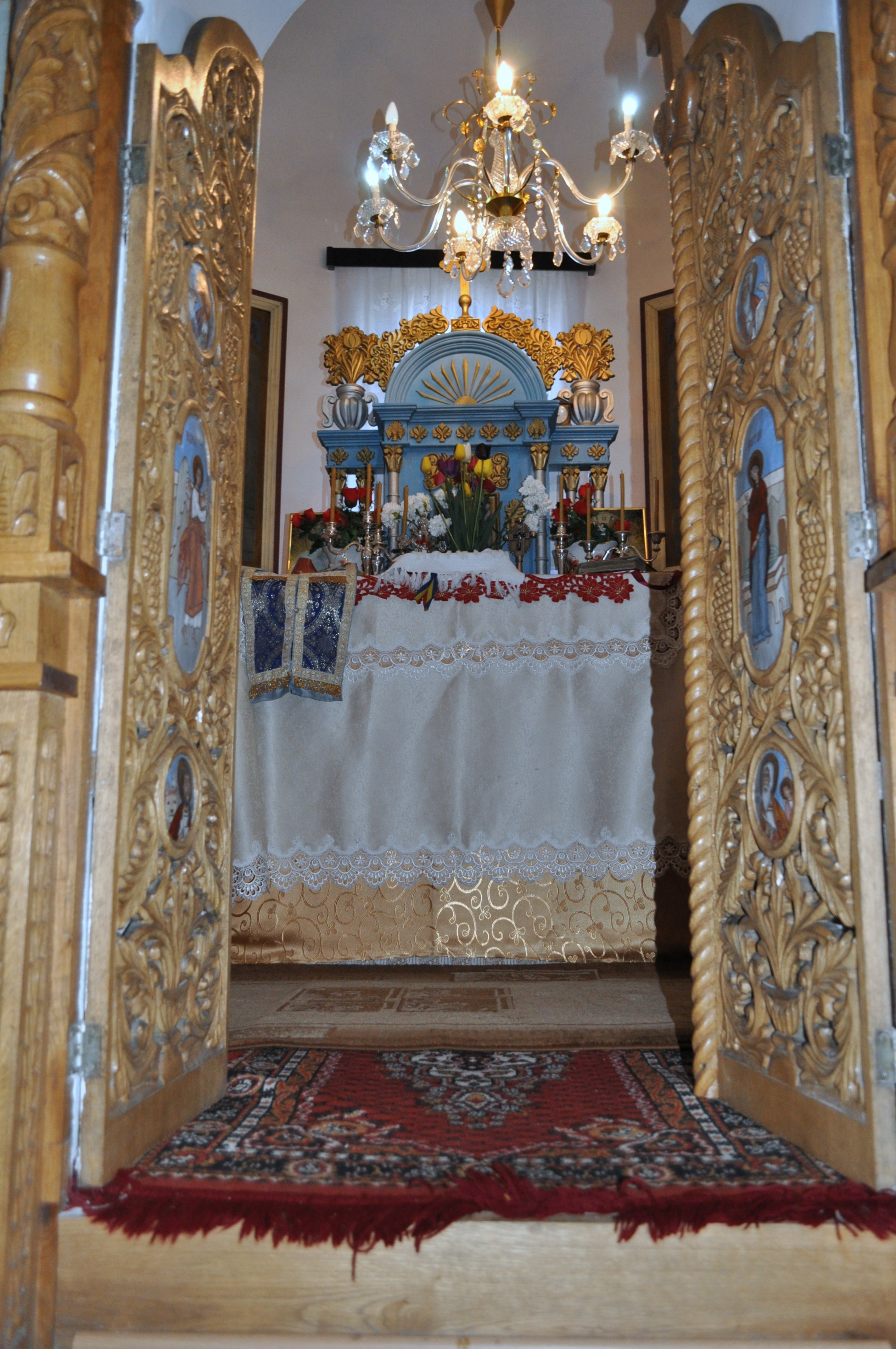 Biserica "Pogorârea Sfântului Duh", sat OSTROV; comuna RÂU DE MORI